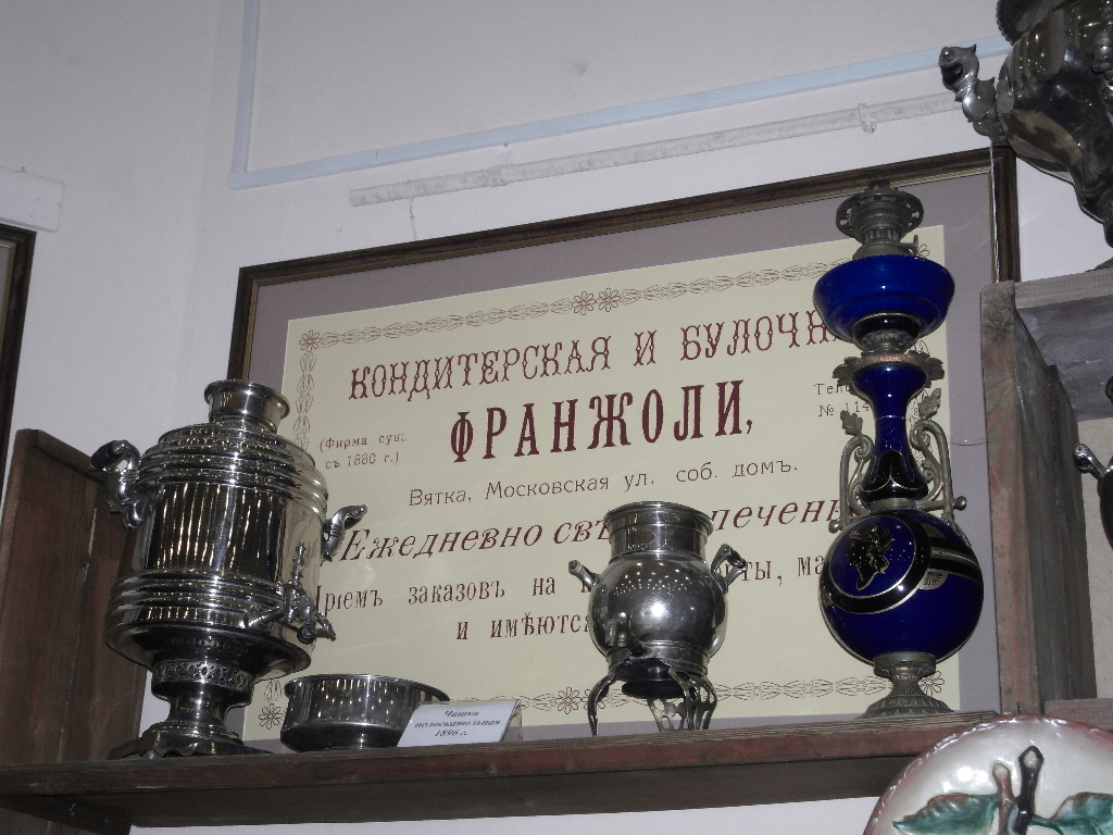 Реклама кондитерского заведения Тимофея Франжоли в Вятке